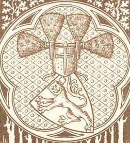 Wappen der Familie von Westernhagen